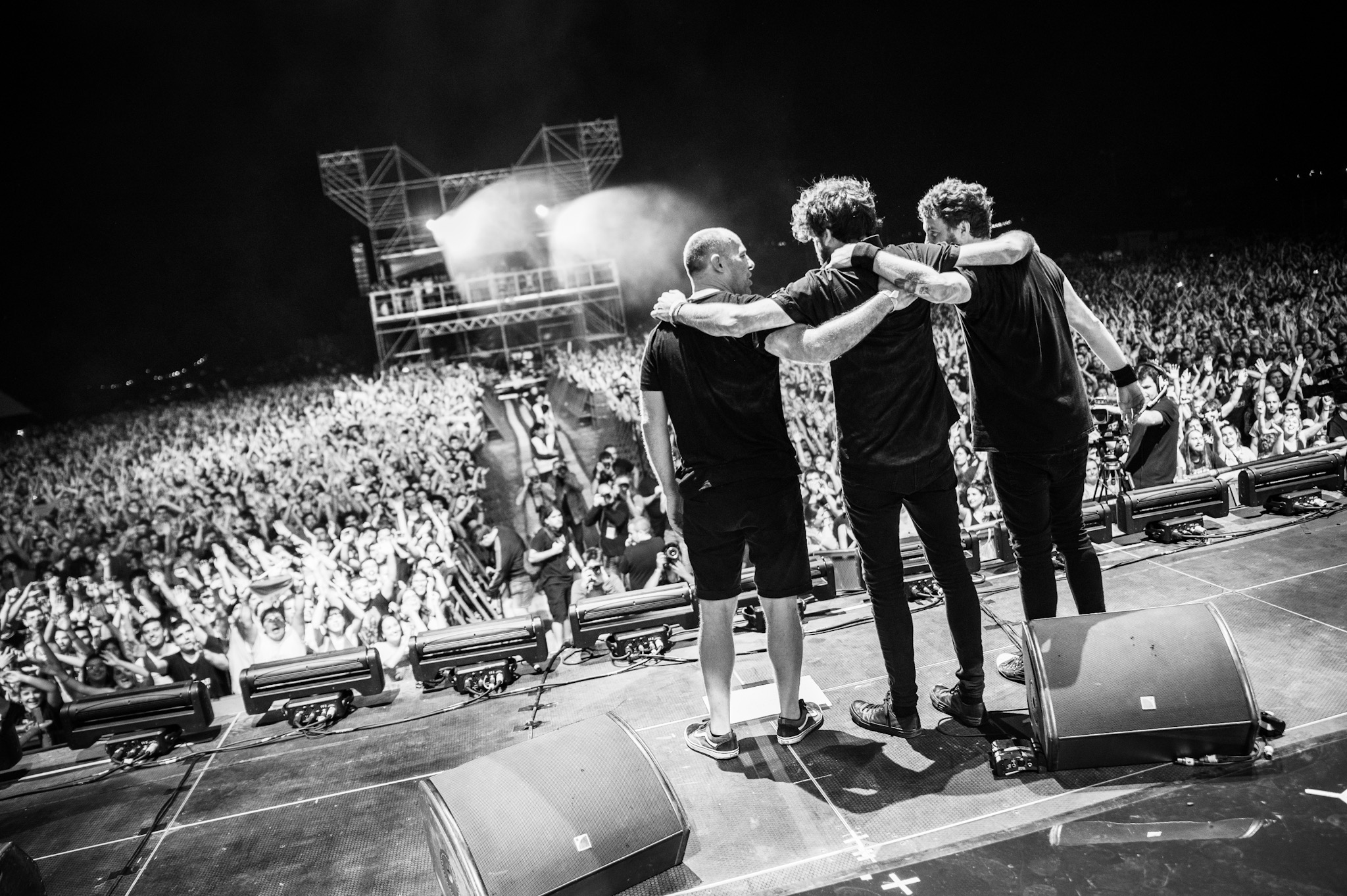 Berri Txarrak Lagunartean kontzertuaren irudiak. Kobetamendin, 2019ko uztailaren 14a. Gaizka Peñafielen argazkiak. Argazkiak edozein erabilerarako libre utzi ditu hemen aitortu duenaren arabera